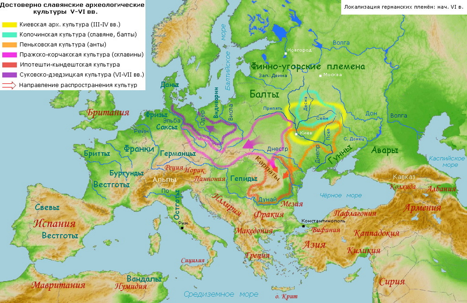 Maps of Slav's archaeological cultures of V-VI c. Ареалы распространения ранних славянских археологических культур (V-VI вв.) и киевской как предположительно изначальной. Ареалы обозначены по картам из книги В.В. Седова «Славяне в раннем средневековье» (1995 г.). Ареал Киевской культуры нарисован по указаниям из разных статей по археологии (компилляция).